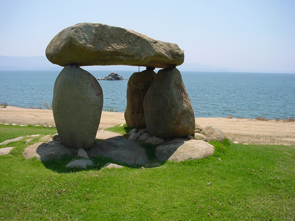 Steinformation bei Ajaccio